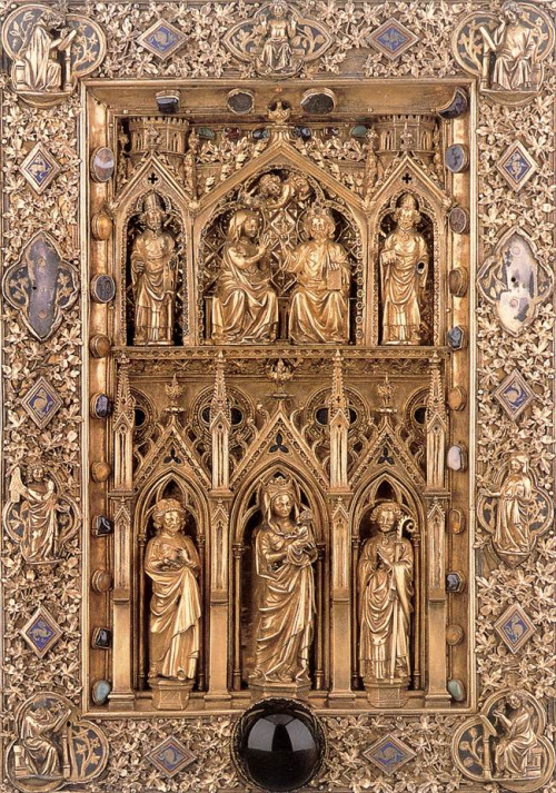 Ювелірна обкладинка євангелія у стилі готики